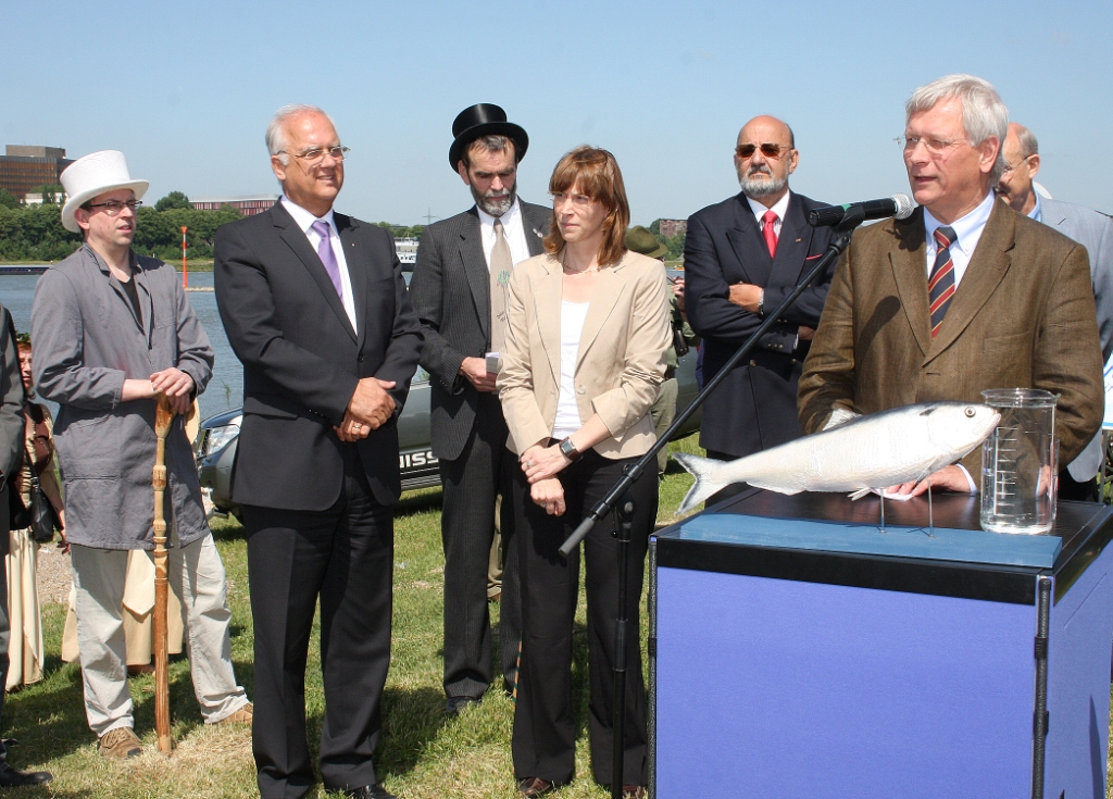 Feierliches Einsetzen der Maifische 2010 mit (von re. nach li.) Eckhard Uhlenberg, Minister für Umwelt, Natur, Landwirtschaft und Verbraucherschutz in NRW; Walter Sollbach, Rheinischer Fischereiverband von 1880 und Vater des Maifischprogramms; Hans Burgwinkel, Reihmeister Poller Maigeloog; Hans Werner Bartsch, Bürgermeister der Stadt Köln; Andreas Hertel, Poller Maigeloog